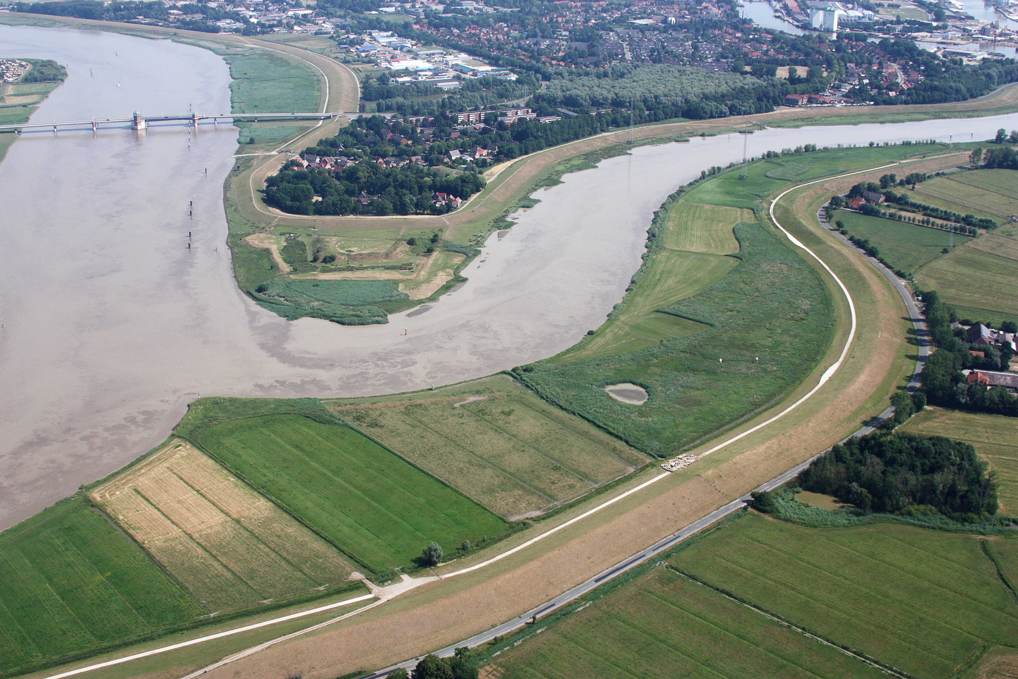 Luftaufnahme; Flug von Westerstede nach Leer; Flughöhe 1500 ft; Juli 2010; Originalfoto bearbeitet: Tonwertkorrektur und Bild geschärft mit Hochpassfilter